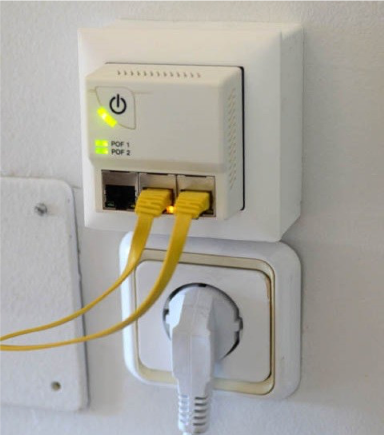 Bi PZO kableak LAN batera konektatuta.